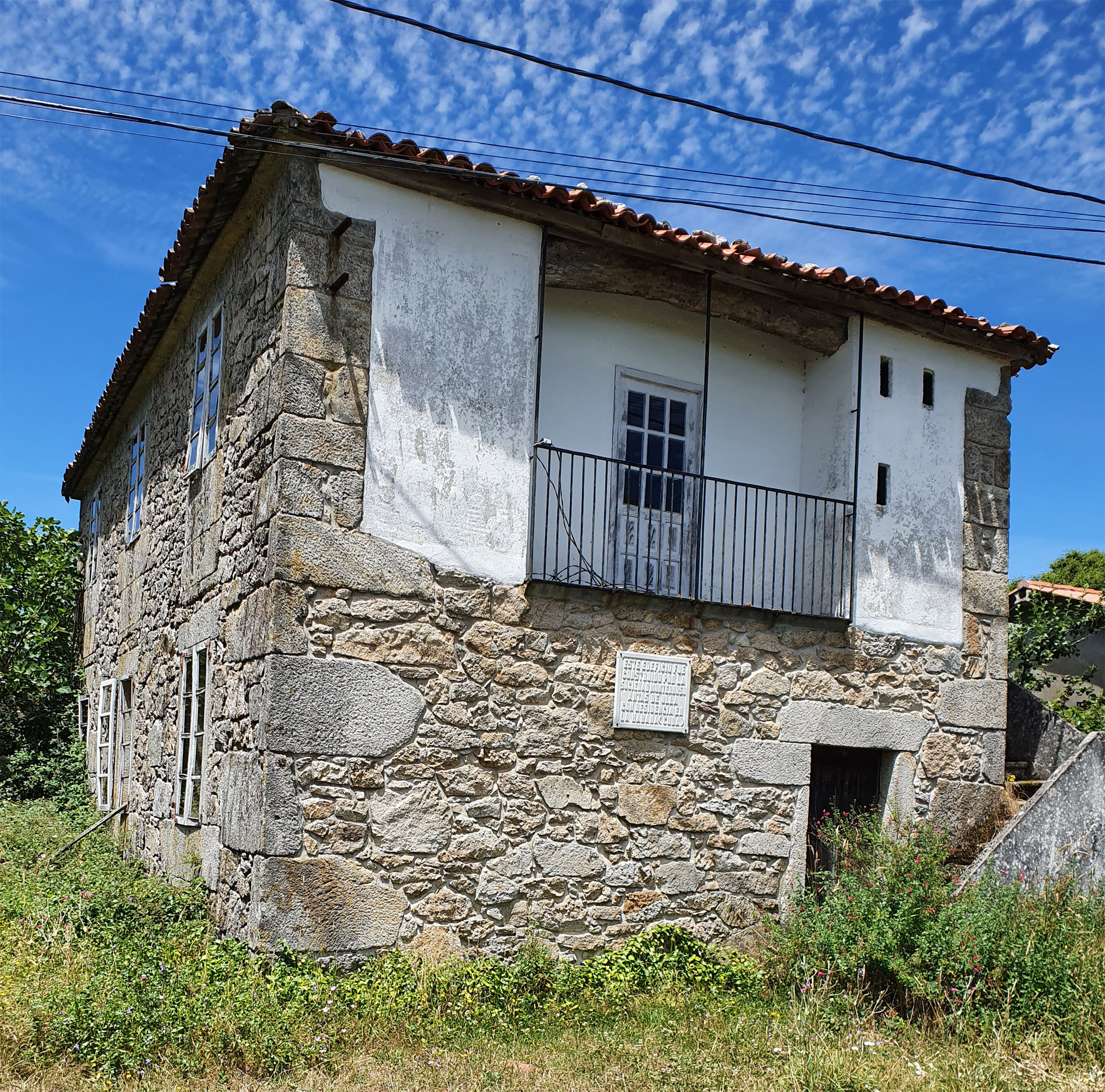 Escola unitaria, das denominadas "escolas de Cuba", por seren financiada coas achegas realizadas polos emigrantes galegos, principalmente, en Cuba. Neste caso foino pola Asociación de Antas de Ulla e Monterroso na cidade da Habana. Ubicada no lugar de Santa Cristina de Areas (Antas de Ulla)